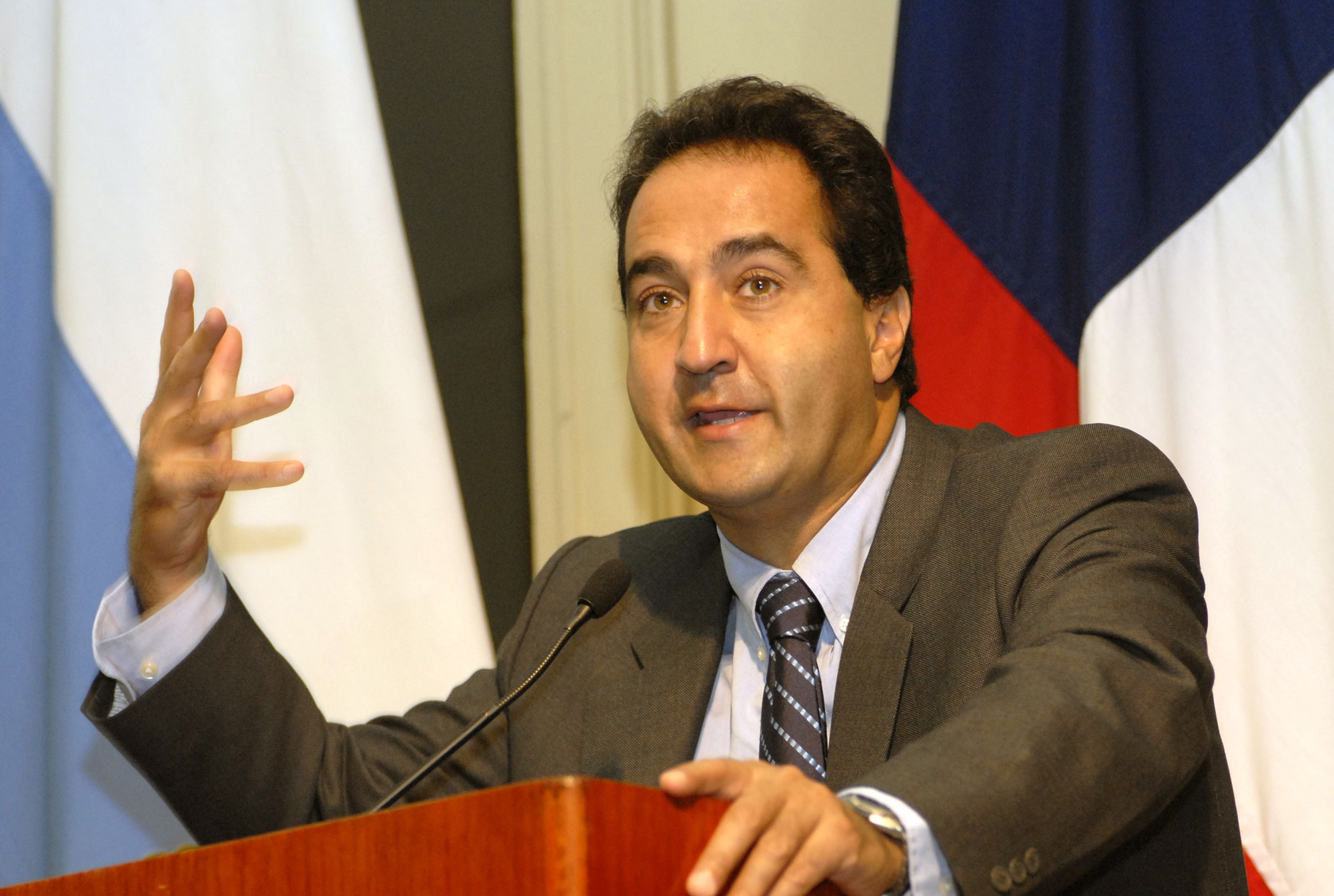 El nuevo portal utiliza la moderna plataforma k12, resultado de un proyecto de investigación y desarrollo de la Escuela de Ingeniería de la Pontificia Universidad Católica de Chile, bajo la dirección del Dr. Jaime Navón, que incorpora todos los últimos avances a nivel mundial, particularmente todos los aspectos que se asocian a la Web 2.0 como Web de lectura y escritura, participación de la comunidad, interfaz de usuario altamente interactiva, entre otros. En la foto, el alcalde de Santiago, Pablo Zalaquett.